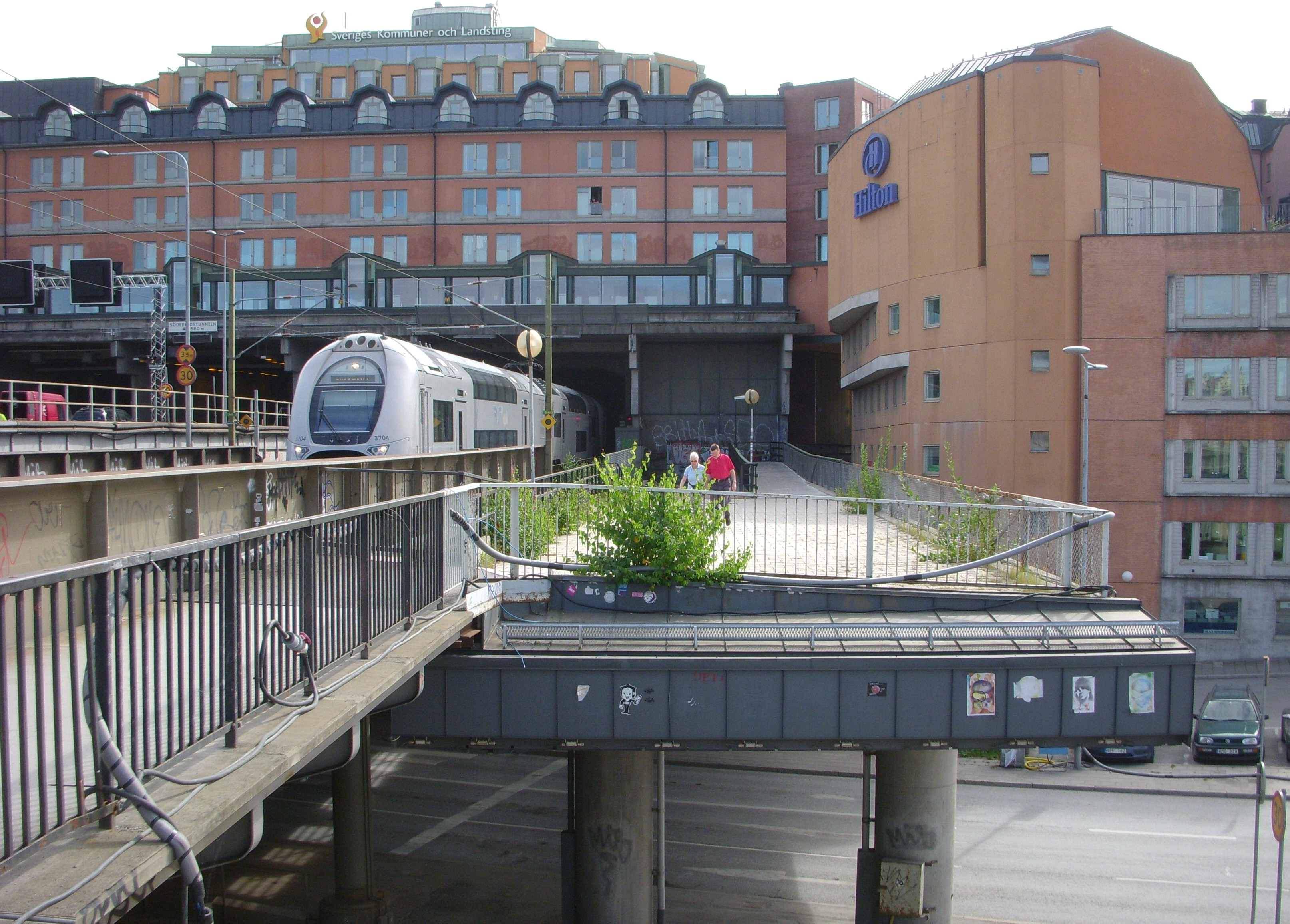 "Tredje spåret" i Stockholm, den påbörjade viadukten som aldrig avslutades